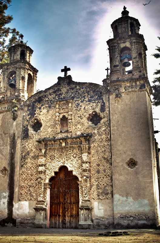 Coyoacan, Ciudad de Méjico